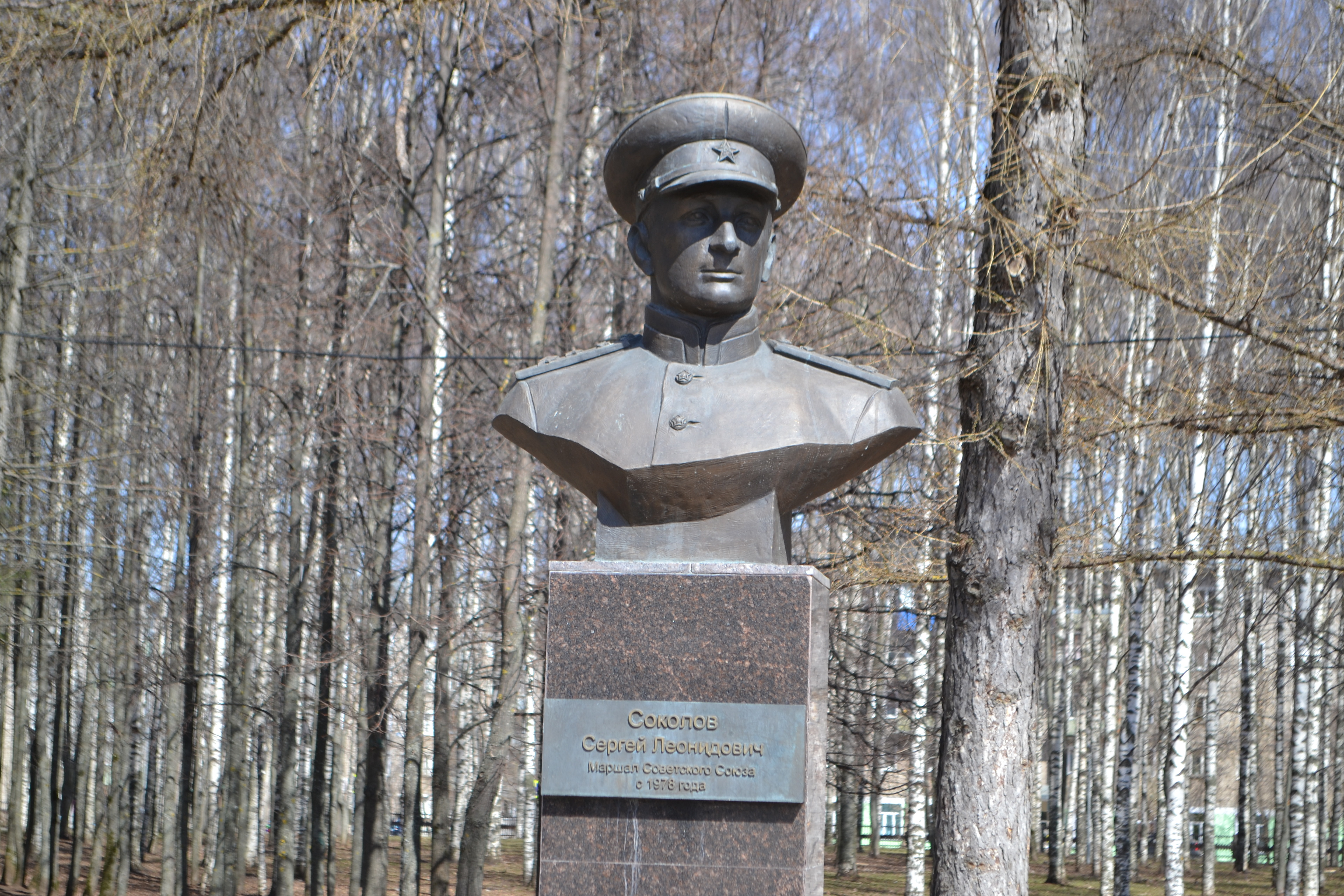 Памятник-бюст Маршалу Советского Союза Сергею Соколову в Кирове 2019 год.